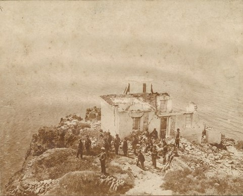 Полуразрушеният фар на н. Галата.